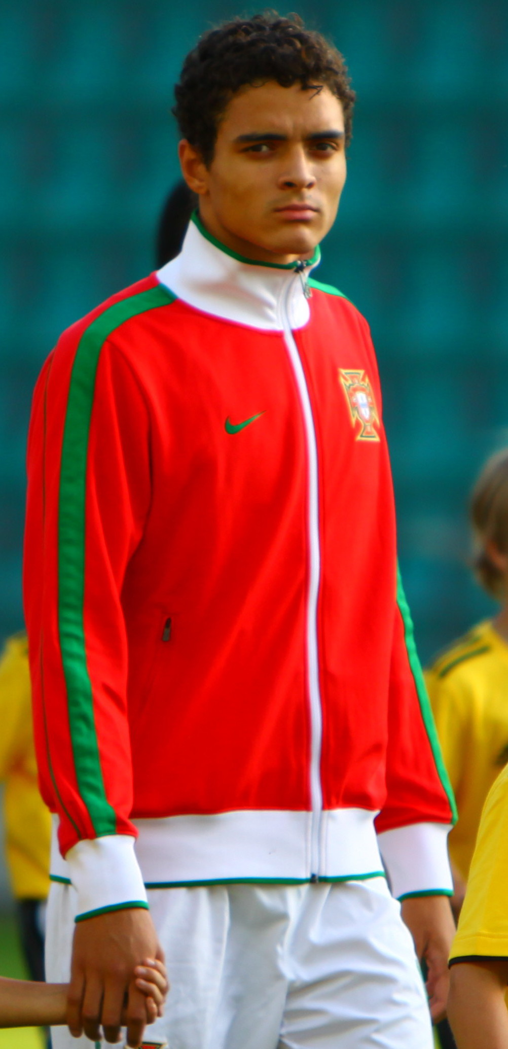 U-19 Portugal vs Spain.